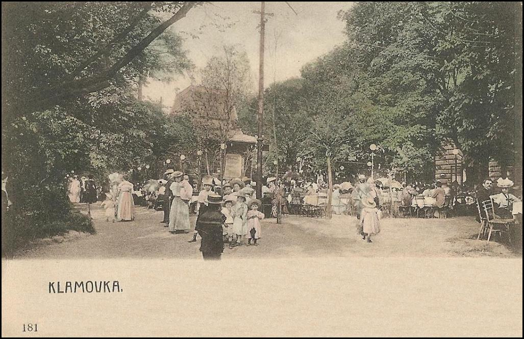 Zábava v pražské restauraci Klamovka.